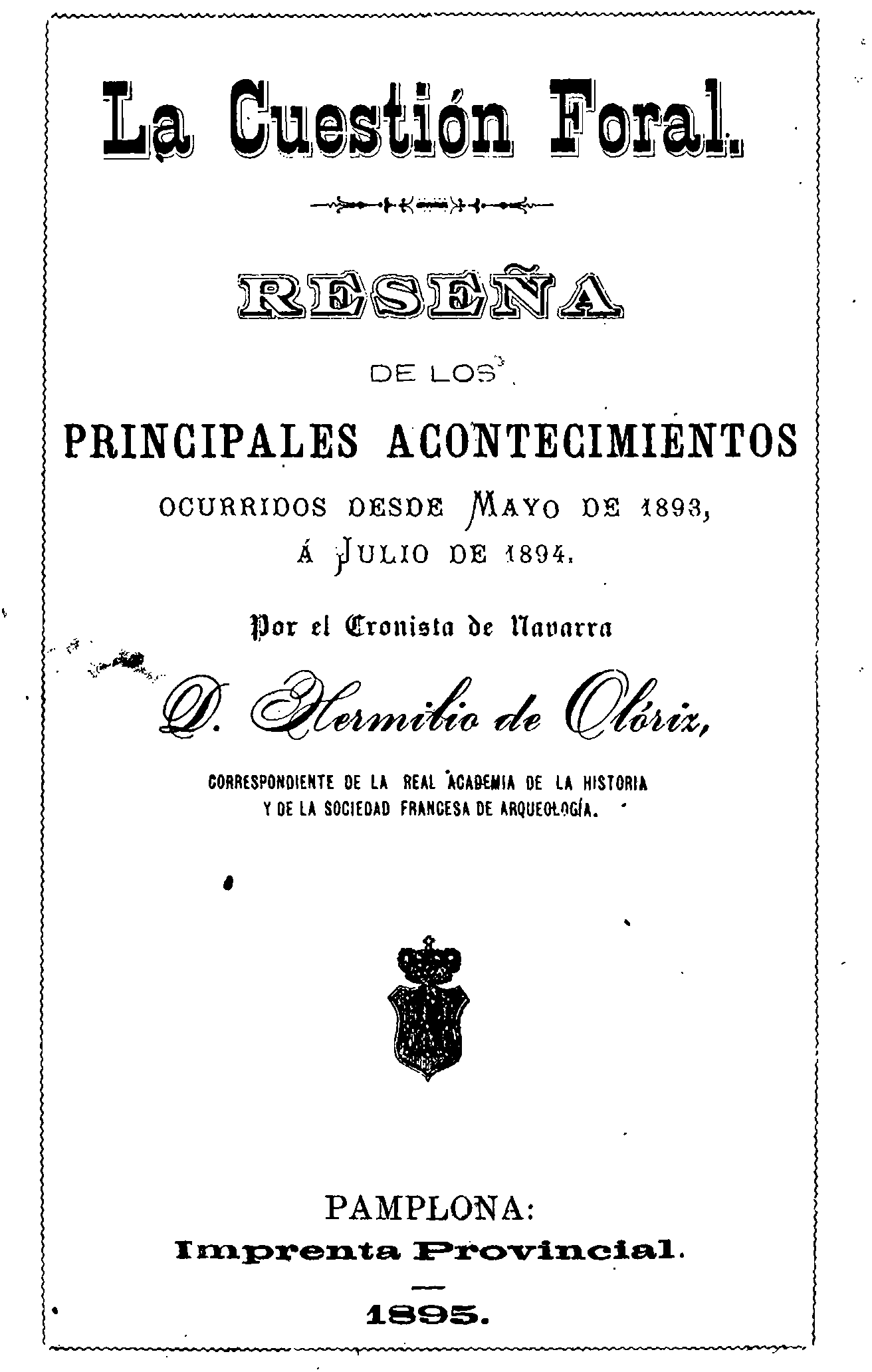 La cuestión foral (cubierta)